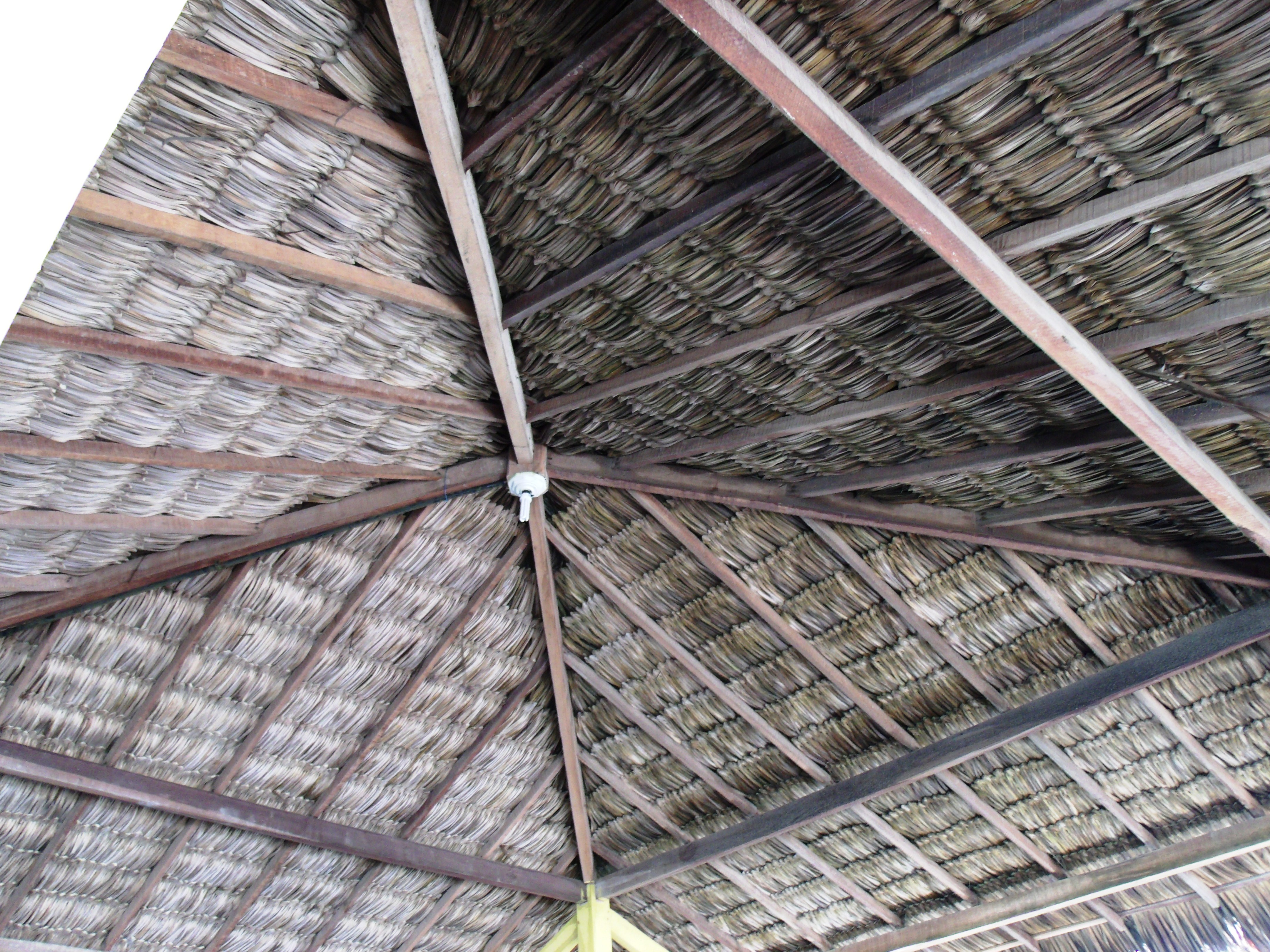 Arquitetura em palha de carnaúba em luis Correa, no Piauí.